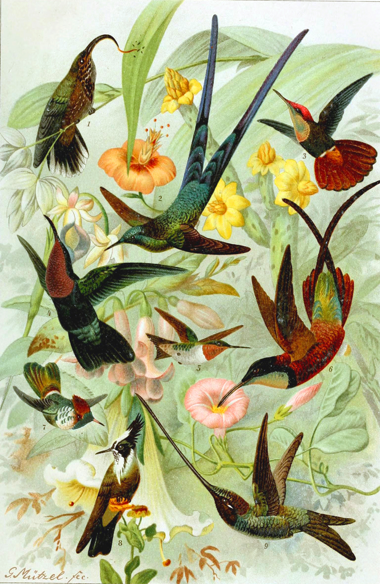 Hummingbirds 1-Eutoxeres aquila 2-Cynanthus cyanurus 3-Chrysolampis mosquitus 4-Eulampis jugularis 5-Archilochus colubris 6-Topaza pella 7-Lophornis magnificus 8-Oxypogon linden 9-Ensifera ensifera